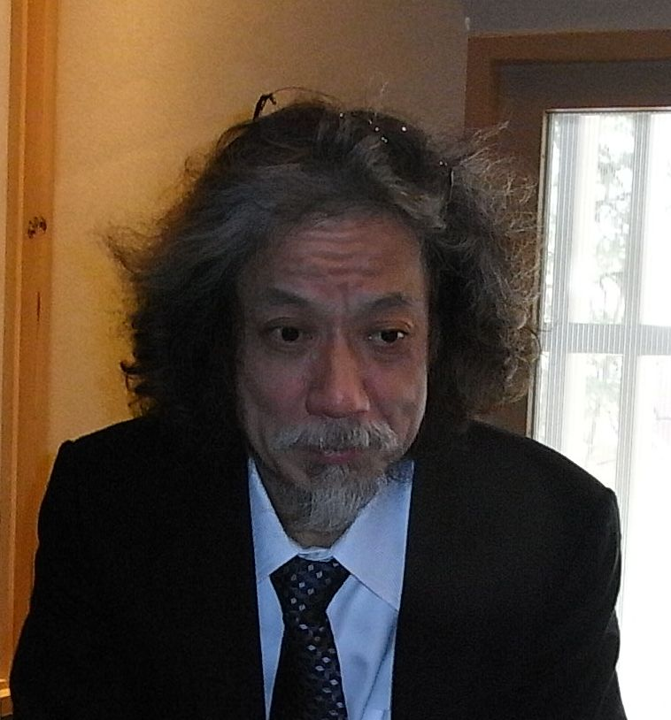 数学者 秋山 仁